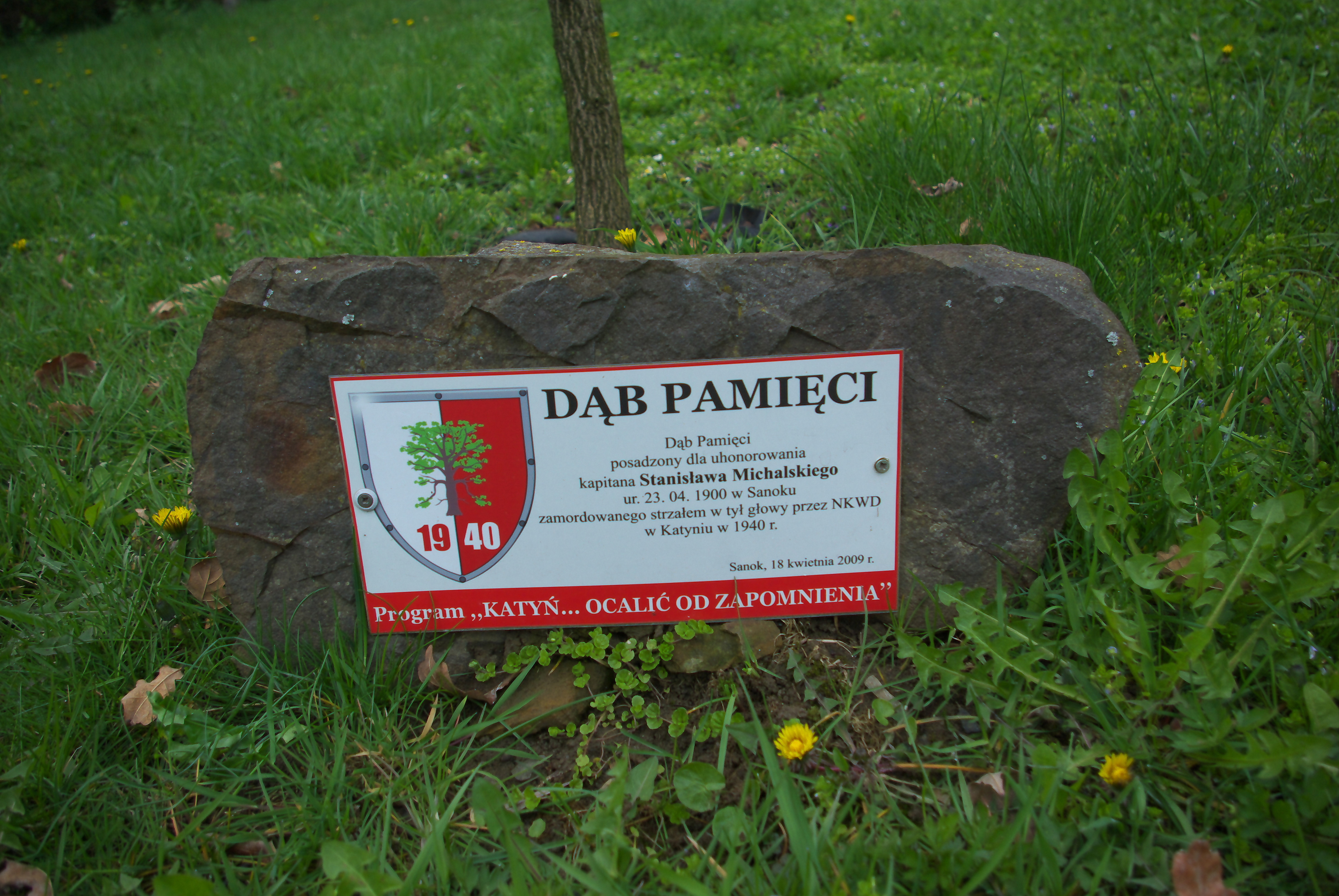 Kamień pamiątkowy przy Dębie Pamięci honorującym Stanisława Michalskiego na Cmentarzu Centralnym w Sanoku